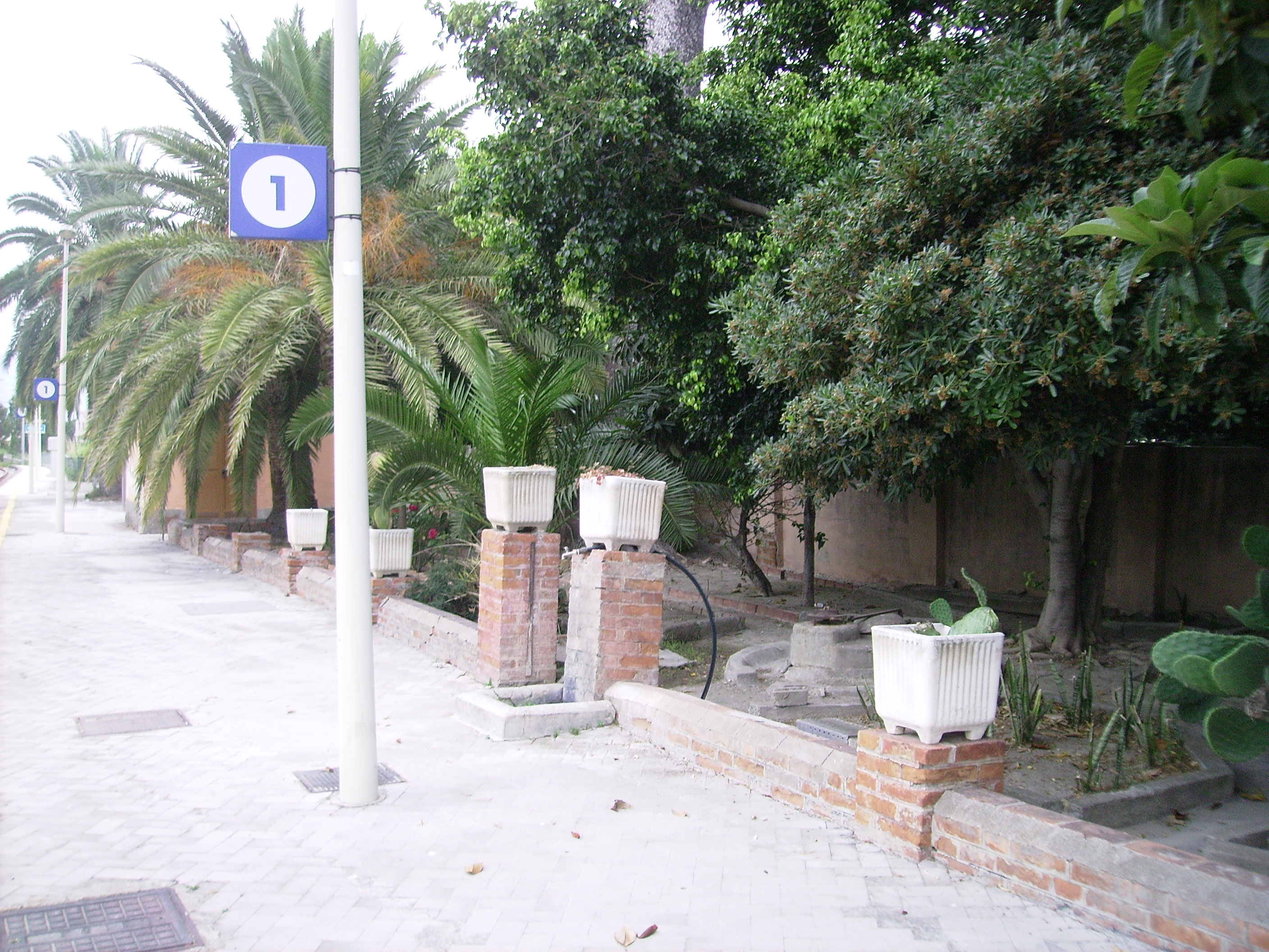 Veduta del giardino ottocentesco della Stazione di Novara-Montalbano-Furnari.